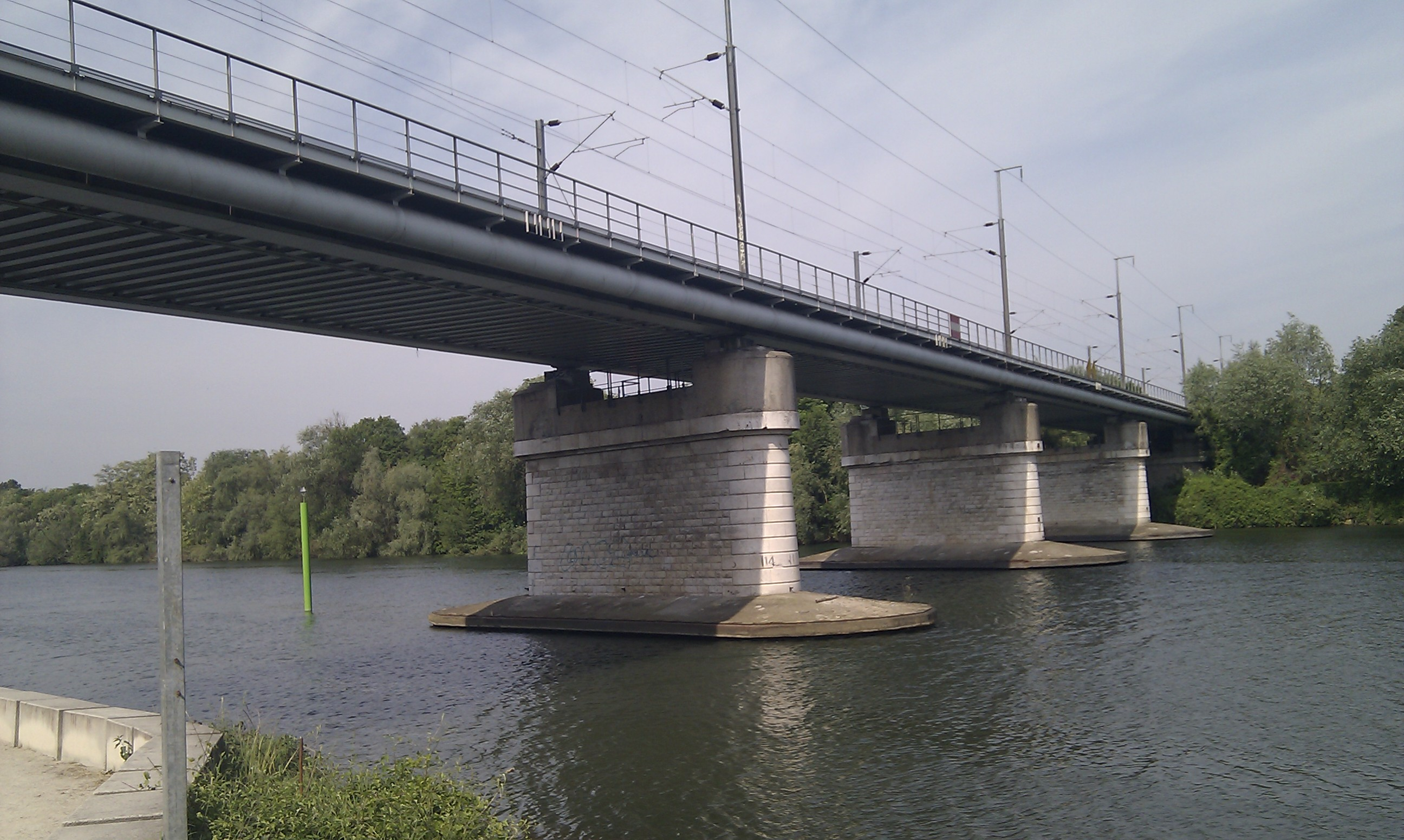 Viaduc ferroviaire (RFF Paris-Saint-Lazare - Le Havre) dit Pont des Anglais passant au dessus de la Seine à Nanterre au chemin de halage.